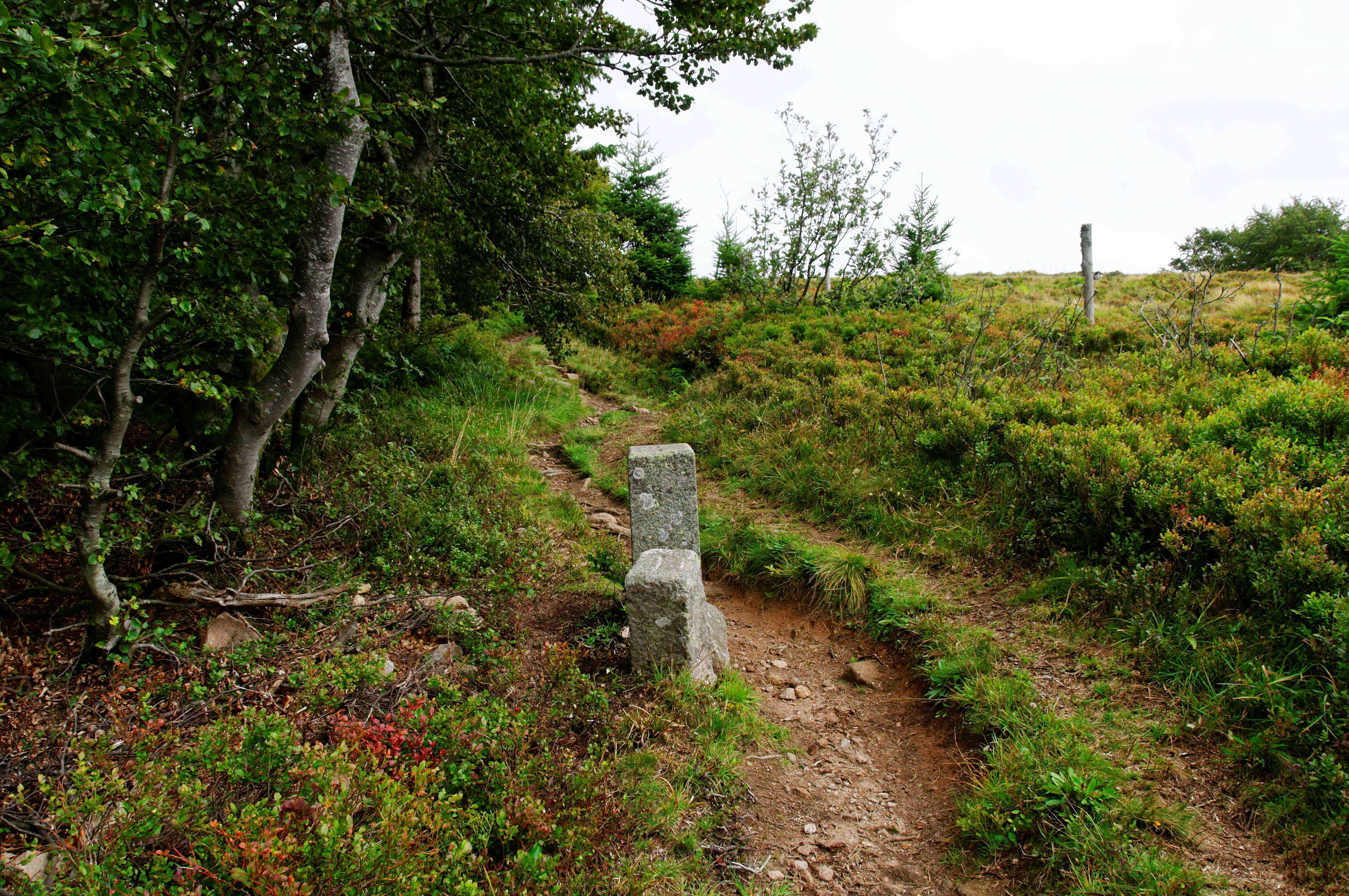 Bornes frontière séparant l'Alsace-Lorraine de la France, suite à la guerre franco-allemande de 1870-71, entre La Bresse et Wildenstein. Boundary stones between Alsace-Lorraine and France, after the franco-prussian war of 1870-71.